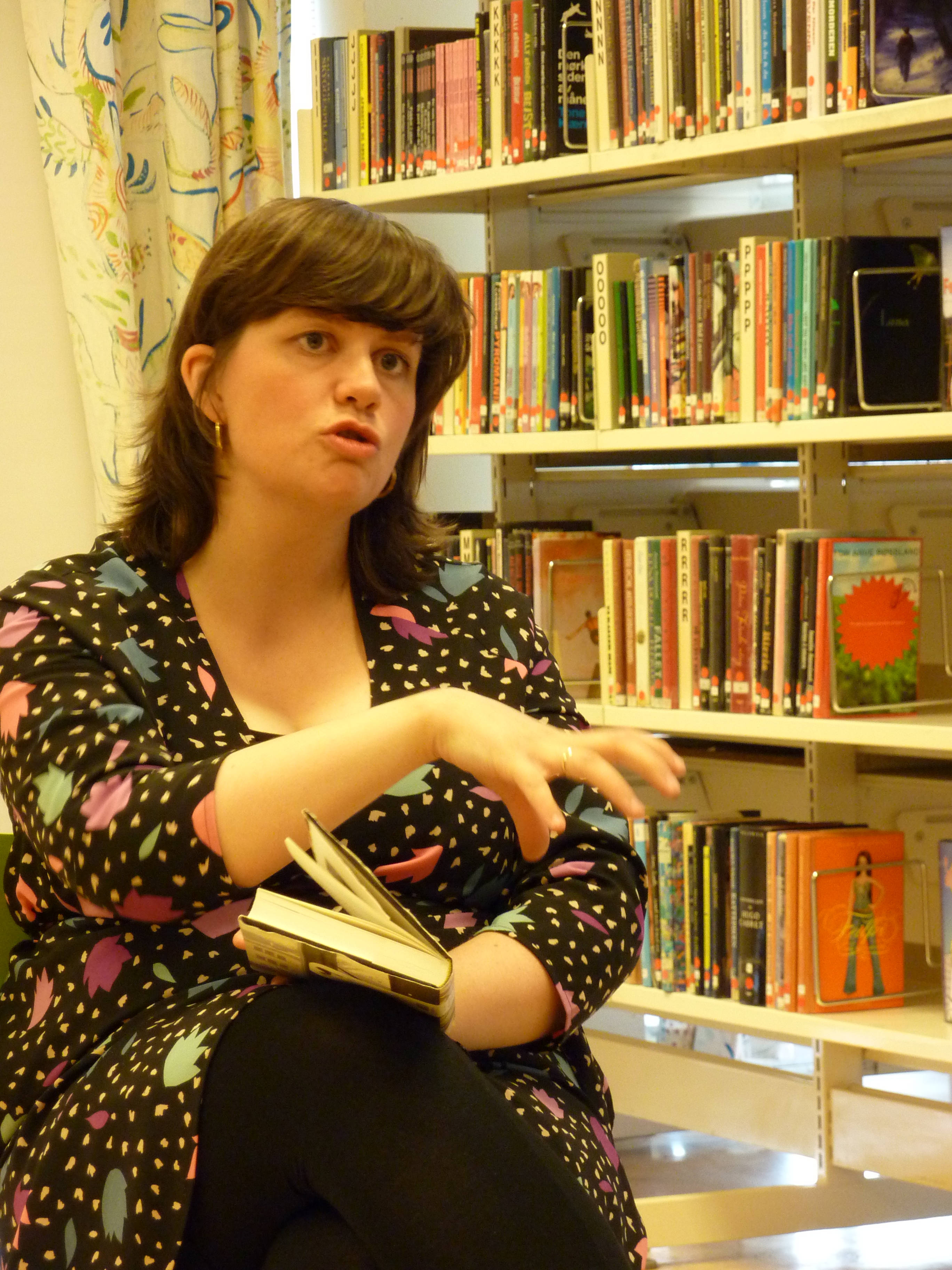 Forfatter Mirjam Kristensen snakker om sin bok "Et rikt liv" på bjerke filial, i anledning verdens bokdag 23. april.